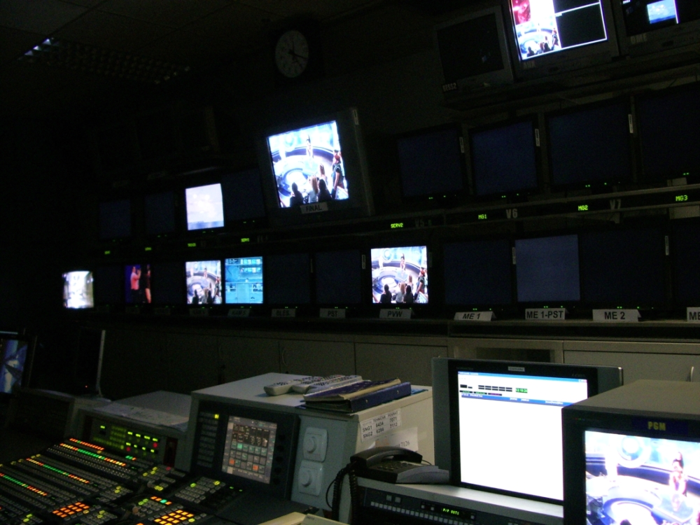 Hrvatska radiotelevizija, Zagreb